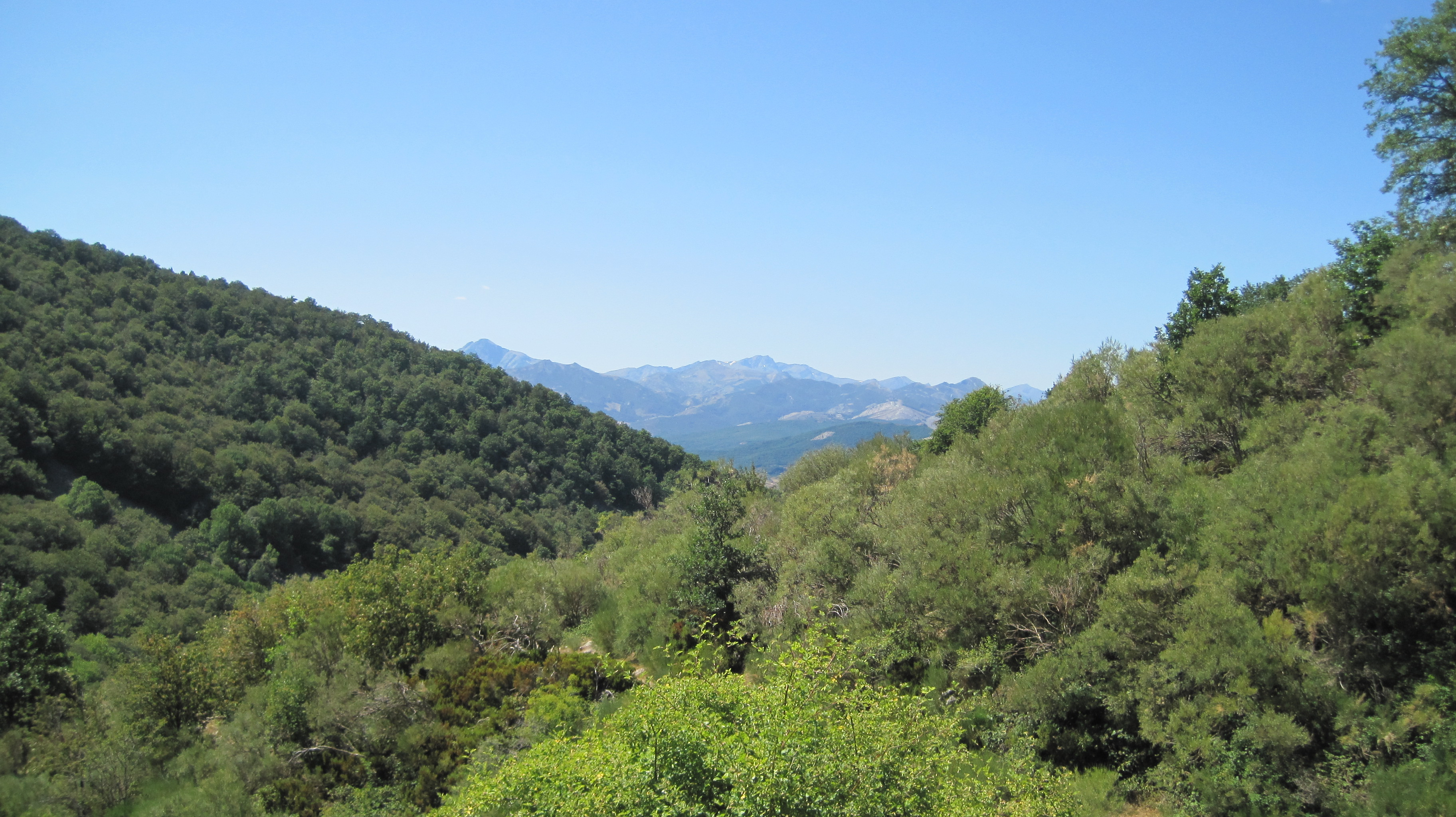 El valle de Redondo desde la entrada a la cueva del Cobre, al norte de la provincia de Palencia (España).